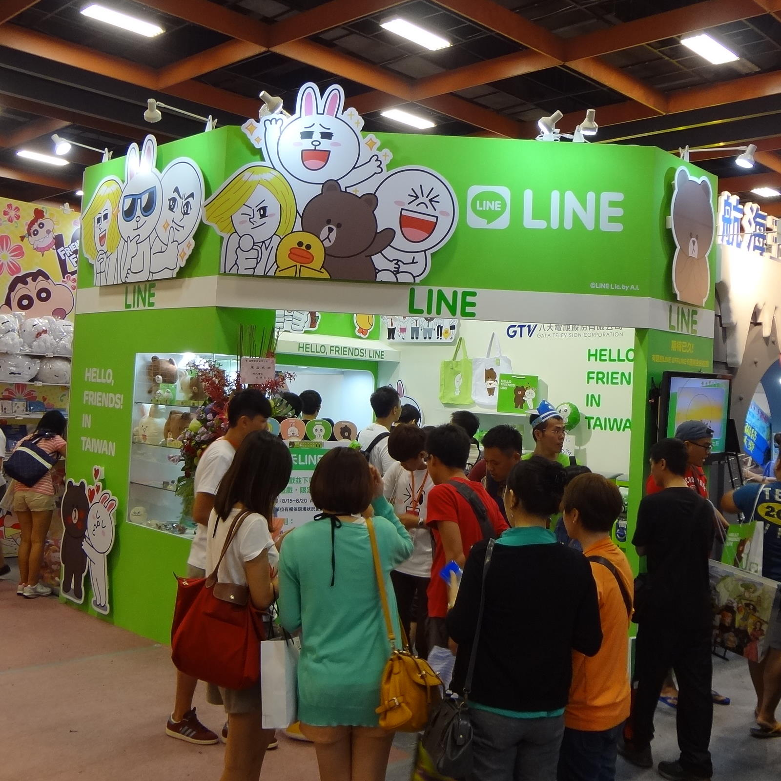 2013年（第14屆）漫畫博覽會，LINE與八大電視"Hello, Friends! in Taiwan"攤位。